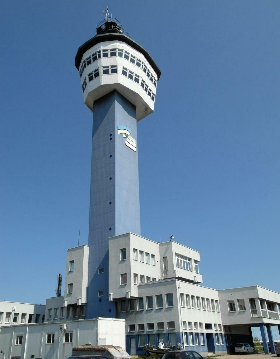 Gdańsk Stogi. Wieża Kapitanatu i latarnia morska widziana od strony Nabrzeża Północnego.